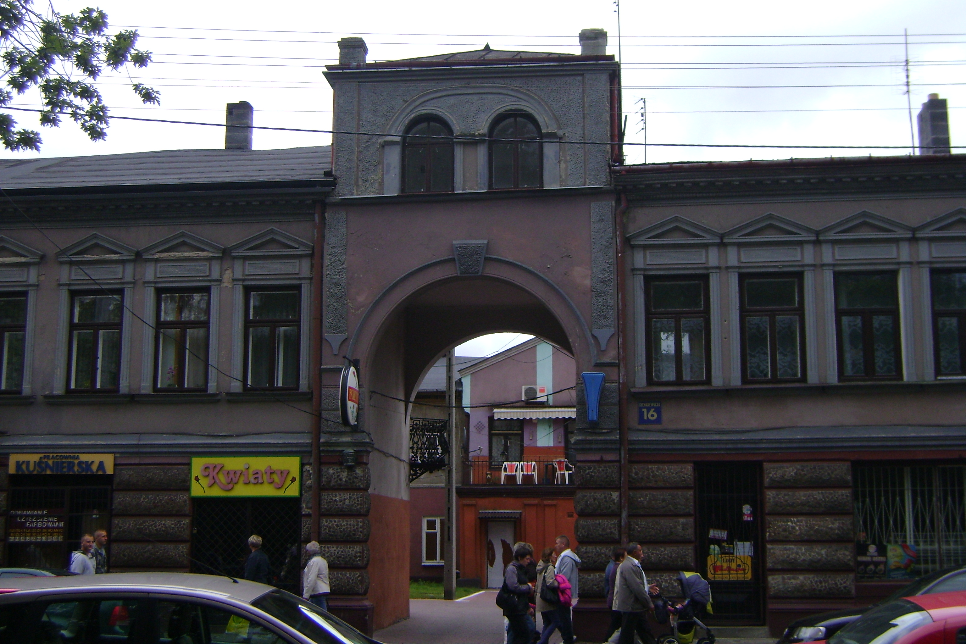 Dom z oficyną, mur., XIX/XX w. Skierniewice, ul. Sienkiewicza 16, Skierniewice 12.1994.